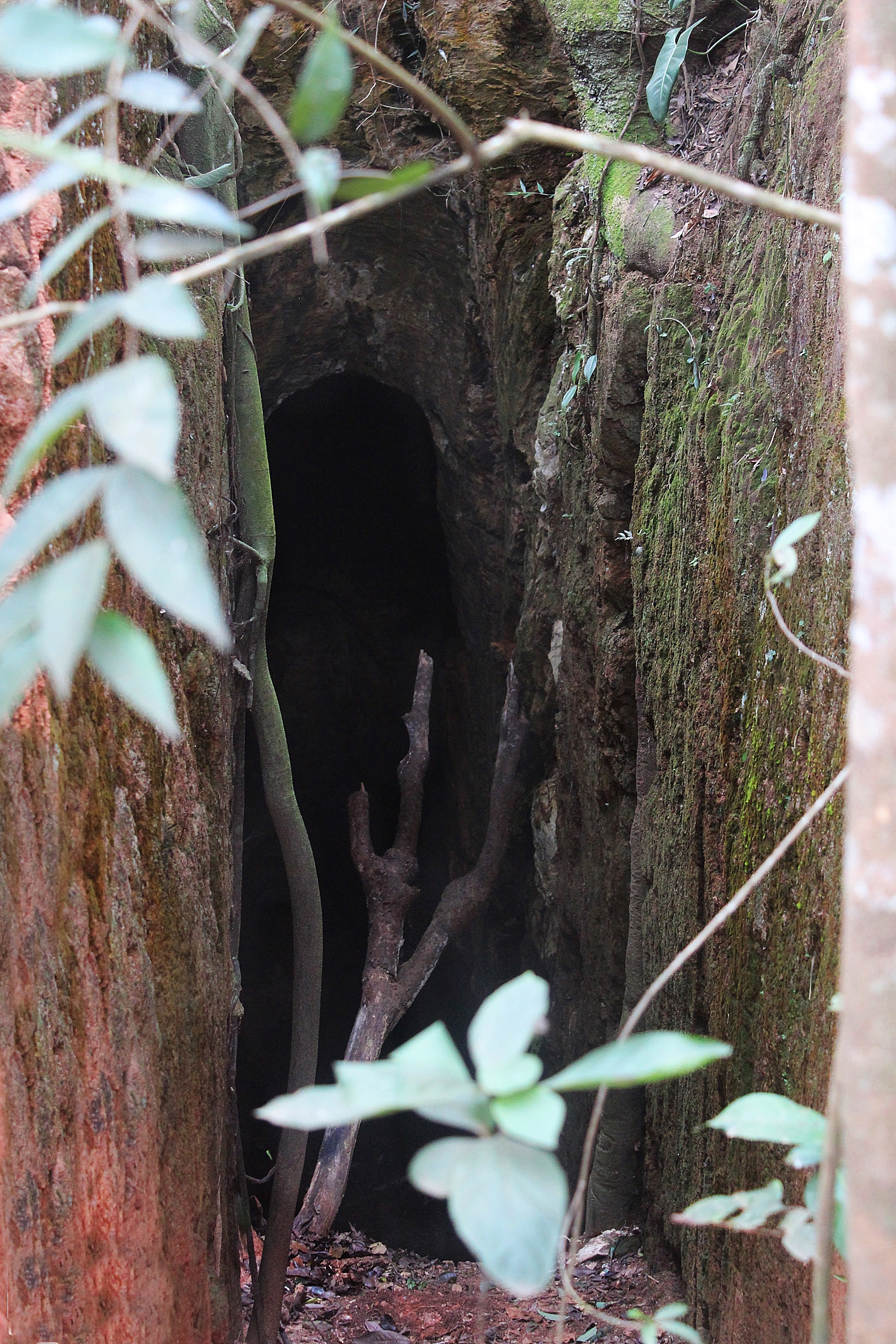 Mina de Ouro Tijucal em Congonhas